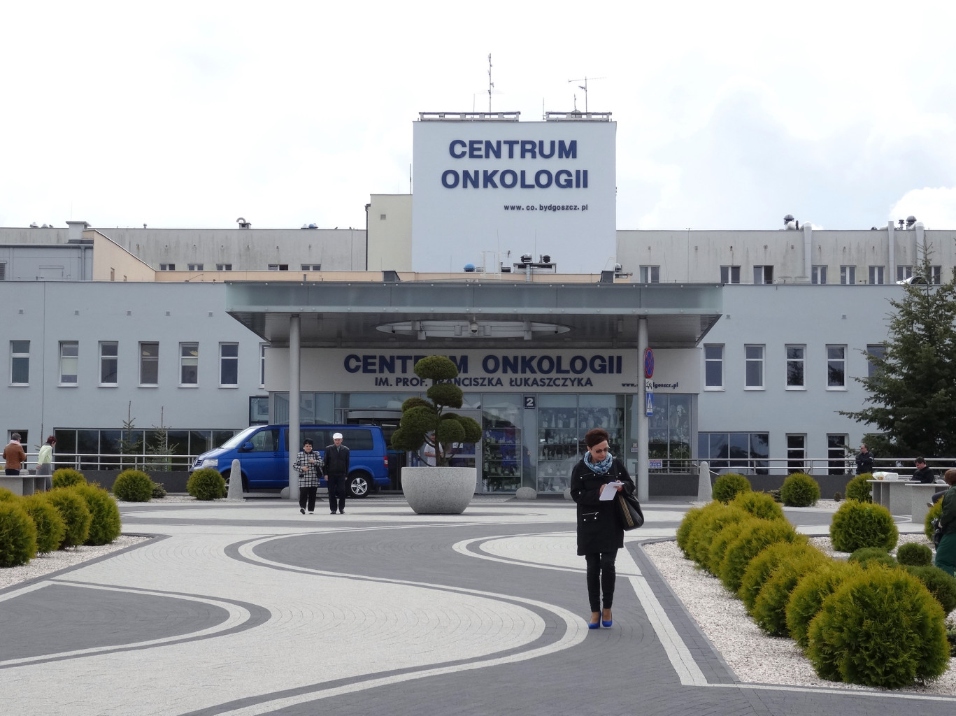 Centrum Onkologii w Bydgoszczy